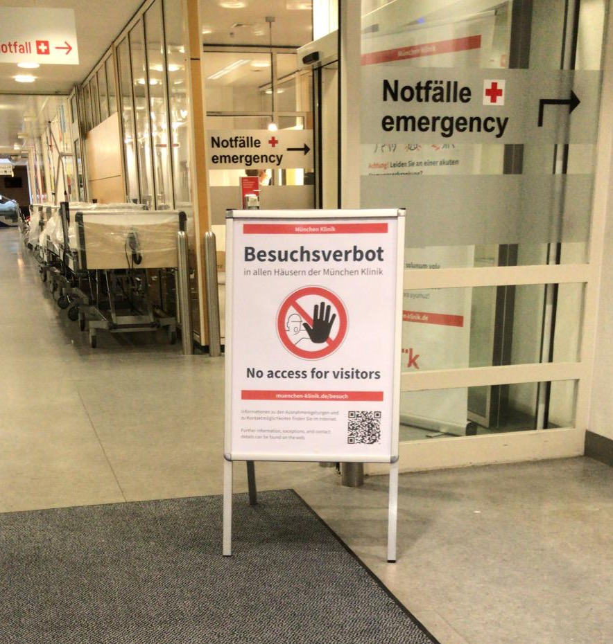 Besuchsverbot in Krankenhäusern wegen Covid19